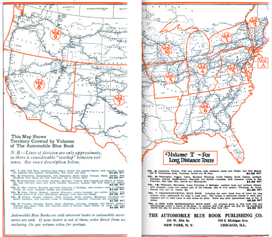 Index map to series of Automobile Blue Book guidebooks.